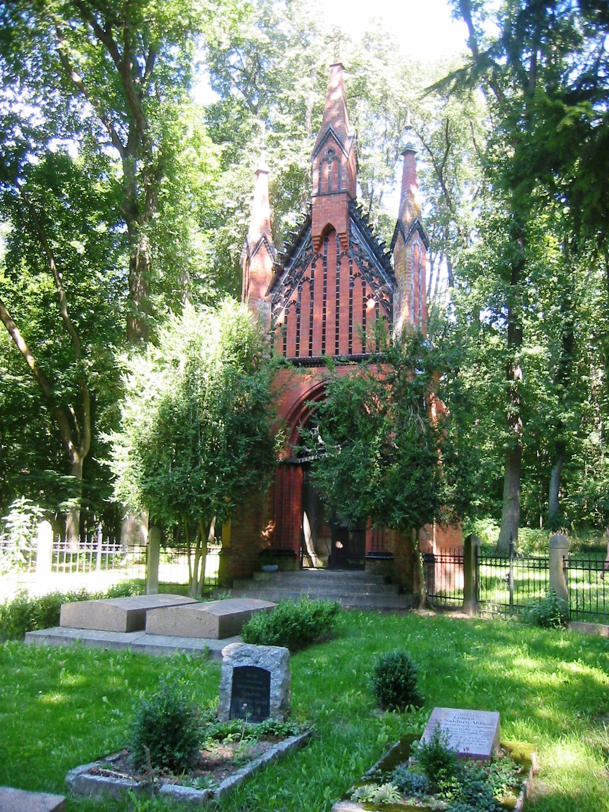 Erbbegräbnisstätte der Ahlimbs/Saldern im Park Ringenwalde der Gemeinde Temmen-Ringenwalde, Uckermark, Brandenburg